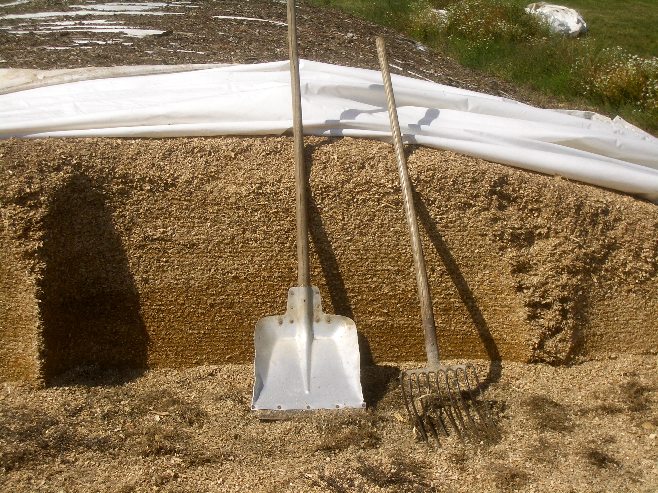 Maissilage auf einem Hof in Zeilitzheim, Bayern, Deutschland